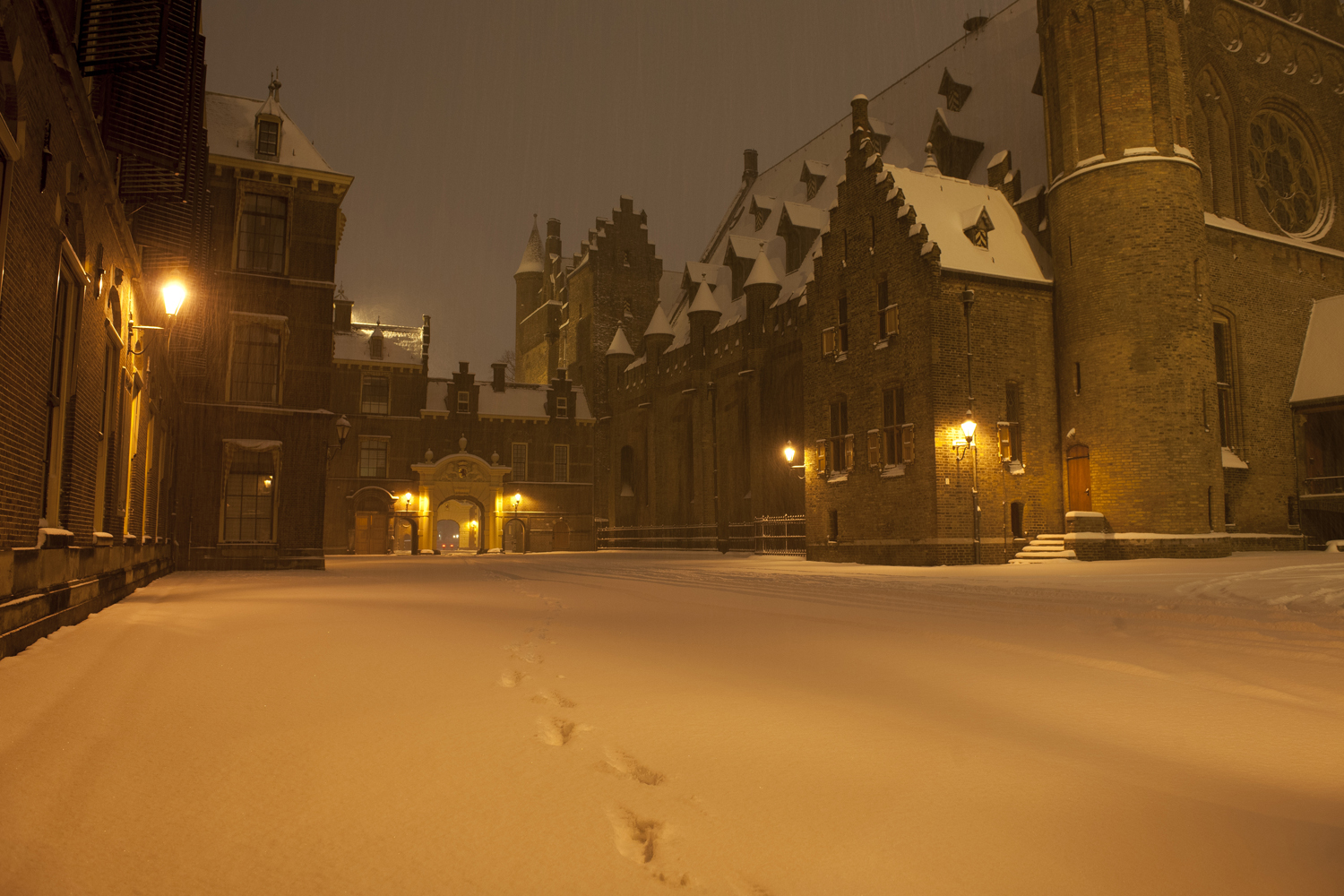 Binnenhof in de sneeuw